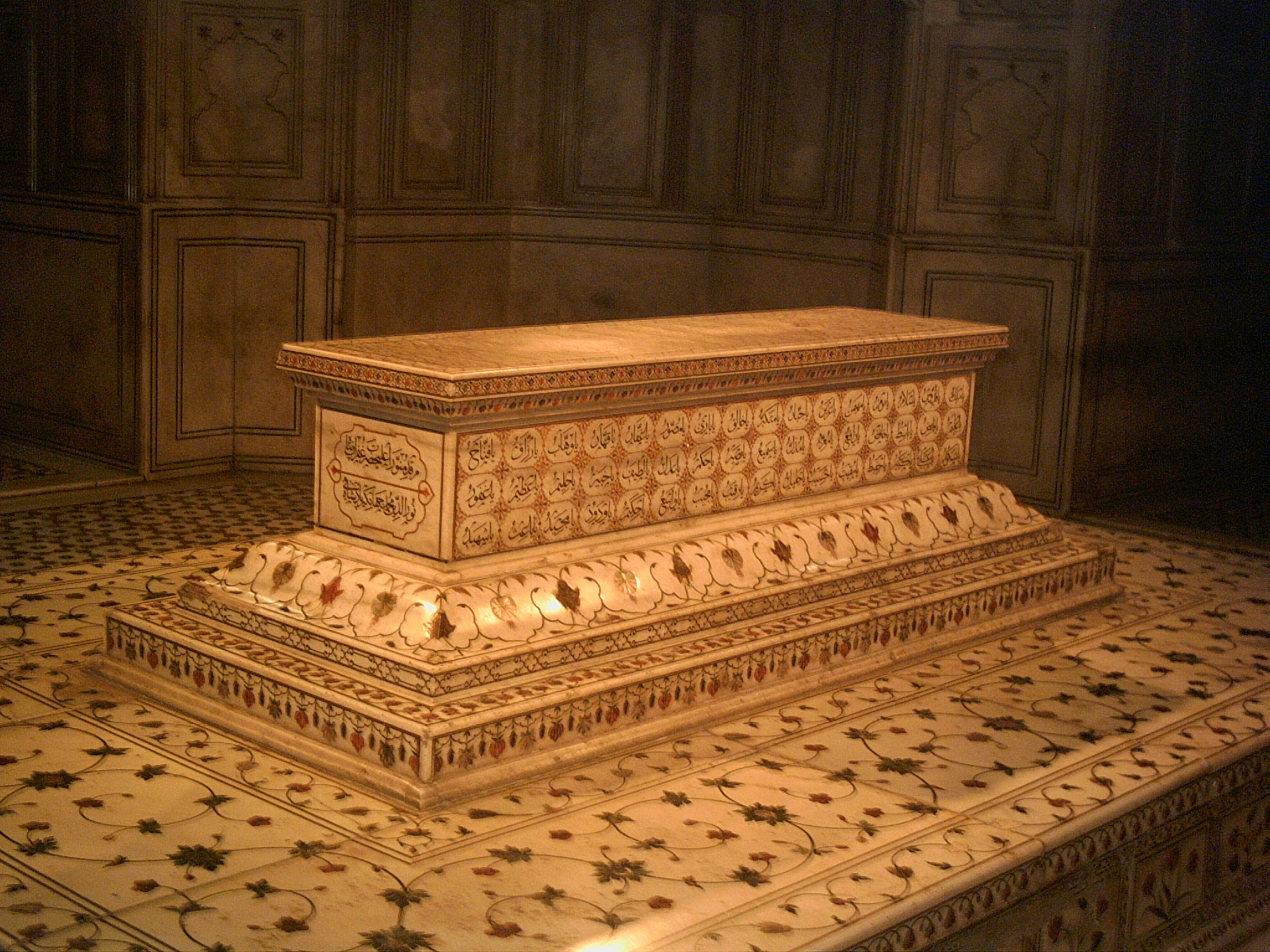 Mughal king Jehangir's tomb